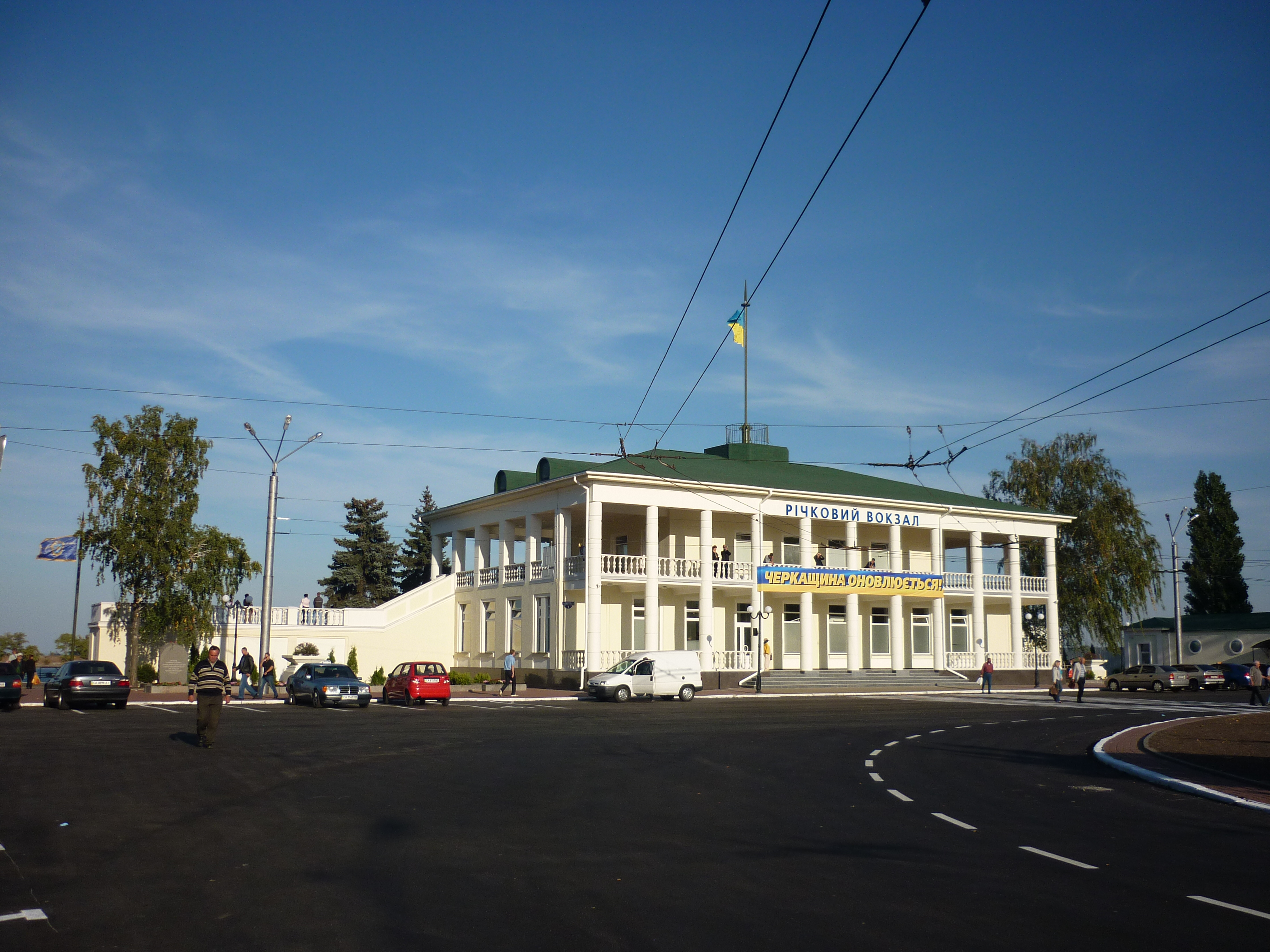 Відбудований та реставрований річковий вокзал в Черкасах